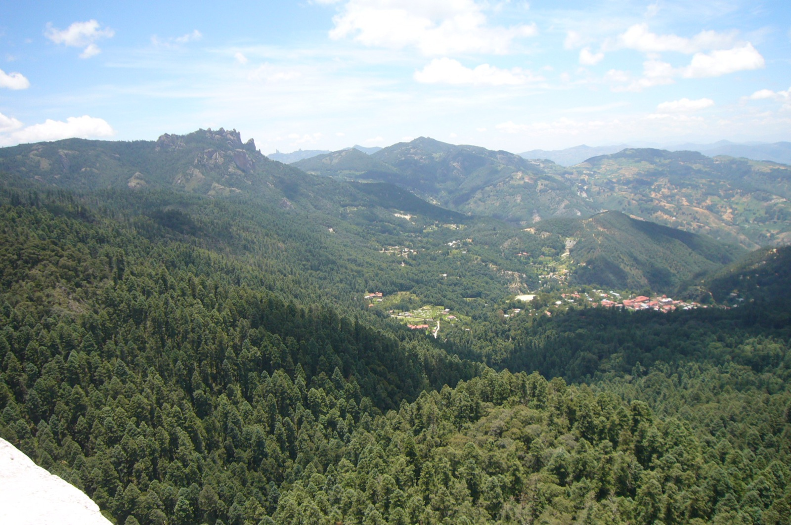 Panoràmica del parque nacional El Chico; al fondo en el centro el poblado de Mineral del Chico, en la prte superior izquierda la peña de Los Frailes